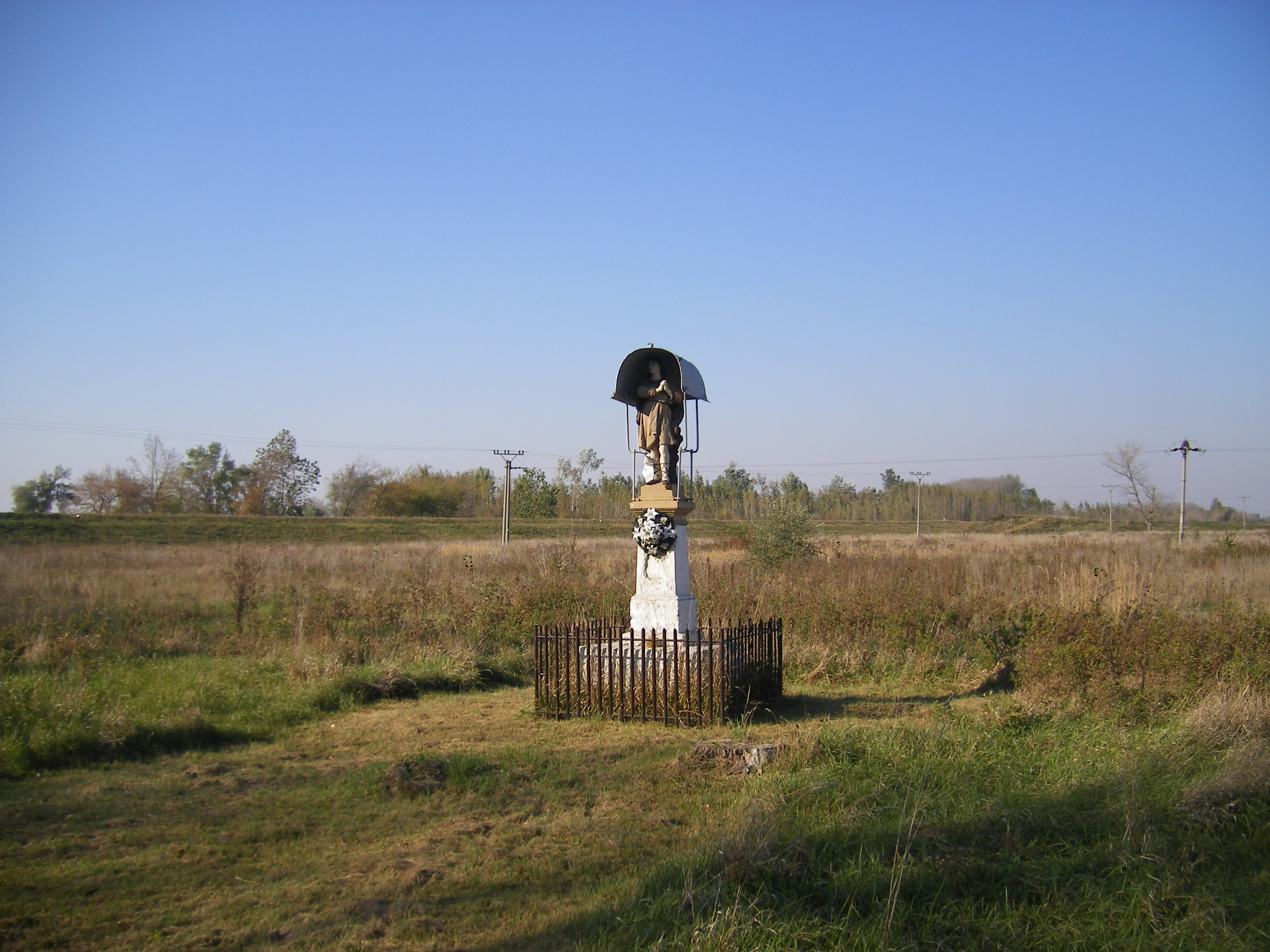 Naszvad - a töltésnél áll Szt. Vendel-szobra.